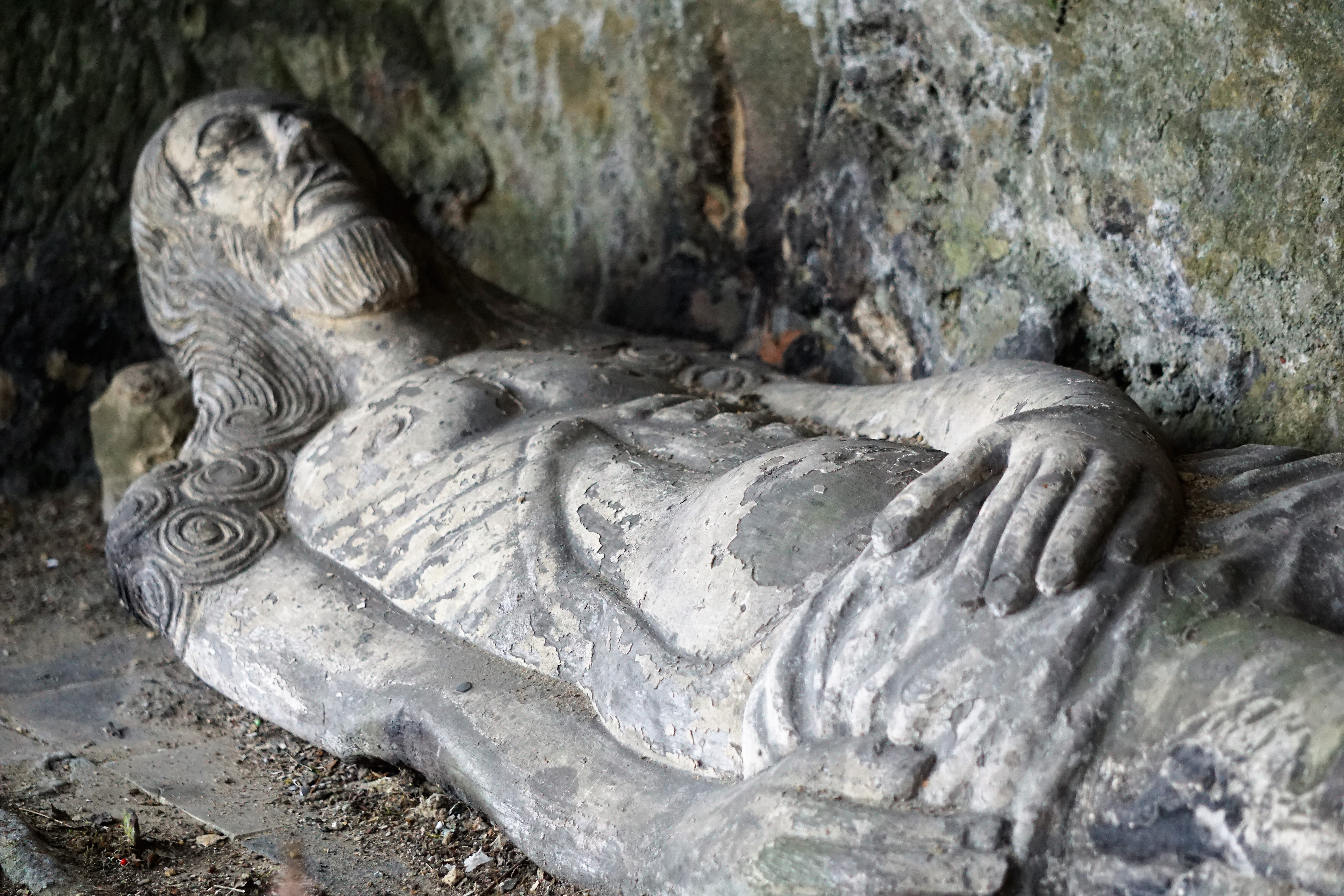 Lëtzebuerg-Lampertsbierg. De Péiter Onrou a senger Grott.